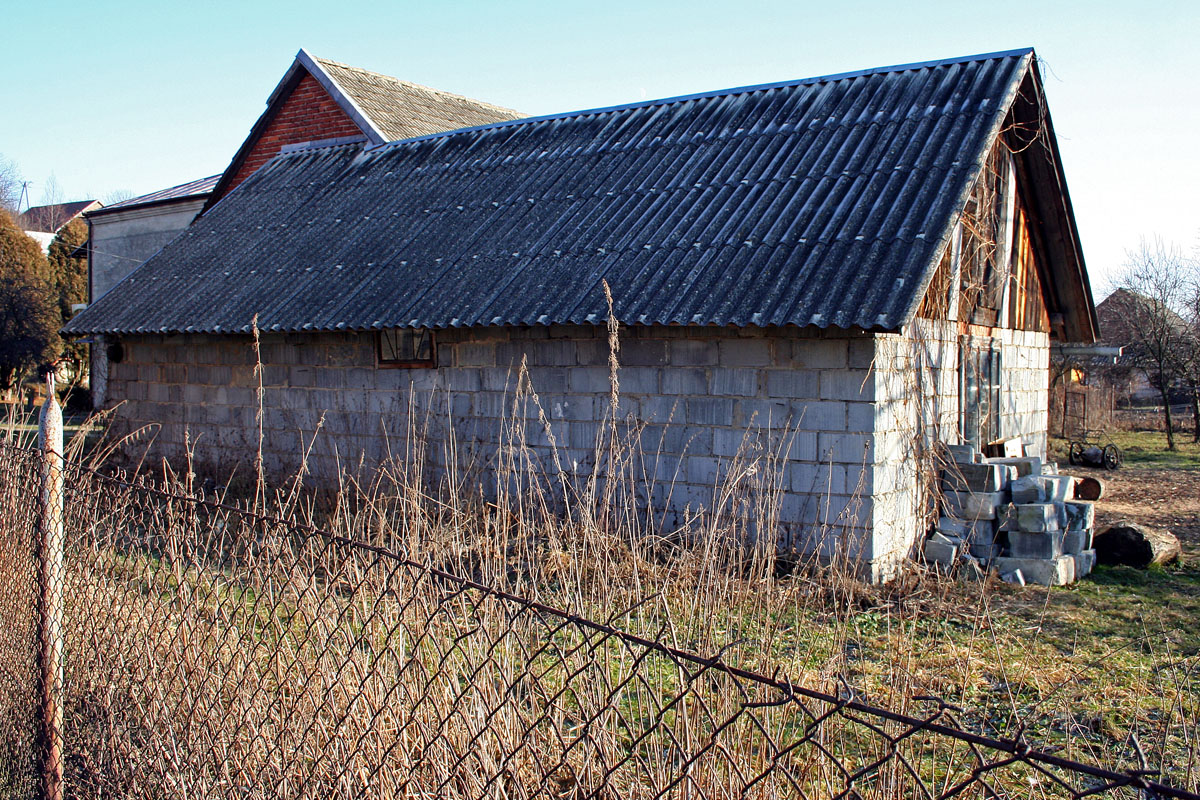 Eternit na dachu.